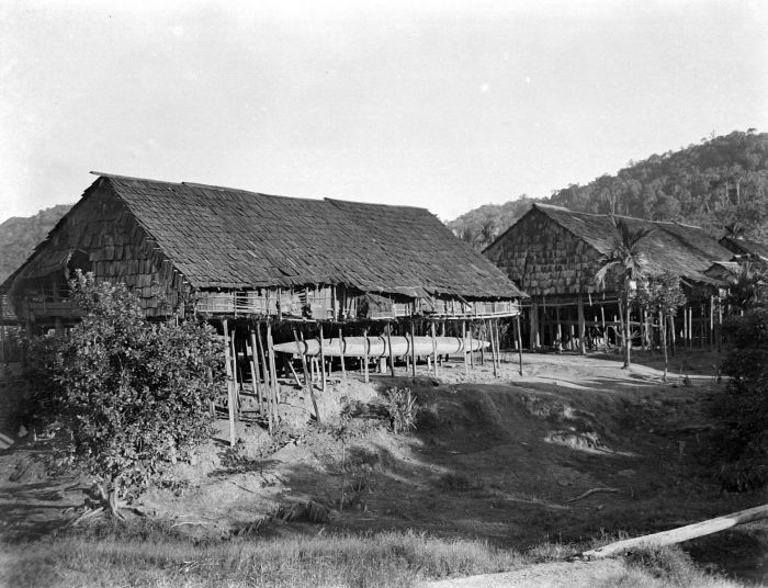 Negatief. Er zijn gevallen bekend van dorpen die uit een enkel 'longhouse' bestonden, maar dorpen met meerdere longhouses waren zeker niet uitzonderlijk. Bij de zeer lage bevolkingsgroei die typerend was voor Borneo tot 1850 en in sommige streken tot 1900, had de lokale bevolking vaak lange tijd voldoende aan één longhouse. Toen echter door een combinatie van grotere veiligheid (verbod op koppensnellen) en betere gezondheidszorg (vooral vaccinatie) de bevolking ging groeien, moesten de dorpen vaak uitbreiden. Overigens kwamen er ook andere extended family (vroeger zei men wel 'grootfamilie') huizen en zelfs eensgezinshuizen voor. (P. Boomgaard, 2001). Langhuizen in een Kenja Dajak dorp in de Apokajan